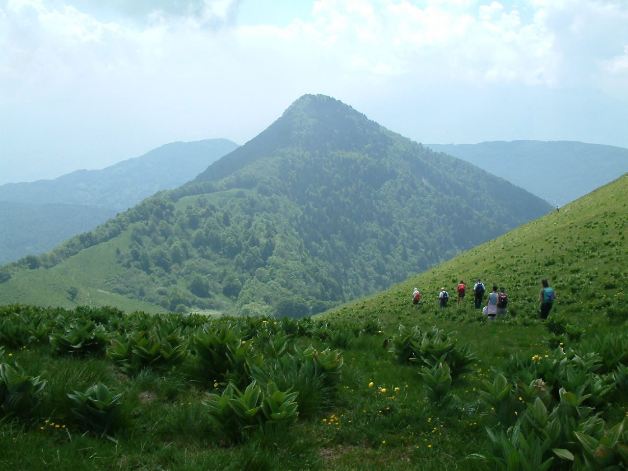 La pointe de la Galoppaz, massif des Bauges (Alpes), Savoie, France. / French Alps